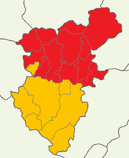 Denizli'de 2014 Türkiye cumhurbaşkanlığı seçimi